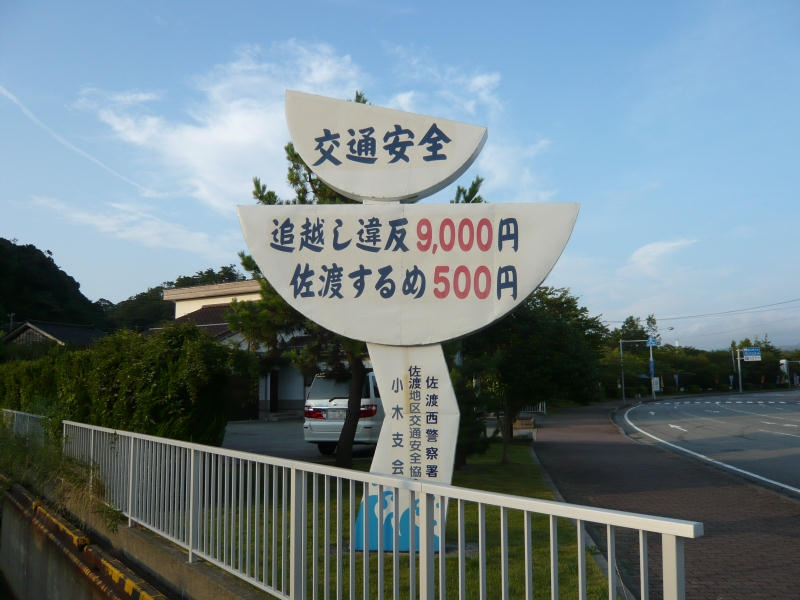 佐渡市小木町、追い越し違反防止の看板。たぶん。